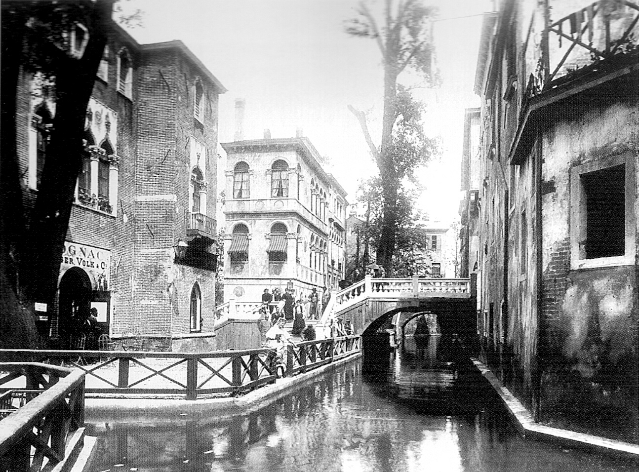 Themenpark "Venedig in Wien" im Wiener Prater, 1895